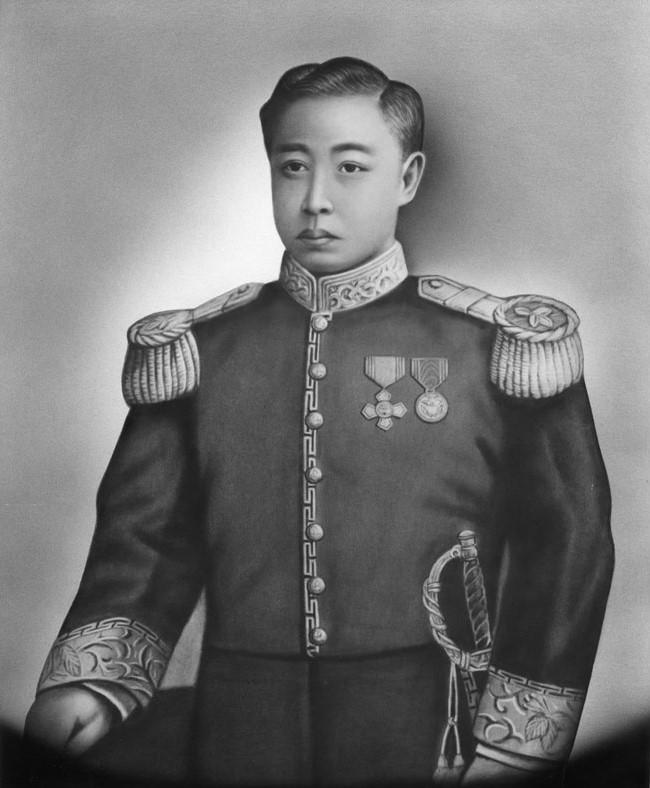 松平(桜井)忠興の肖像写真。